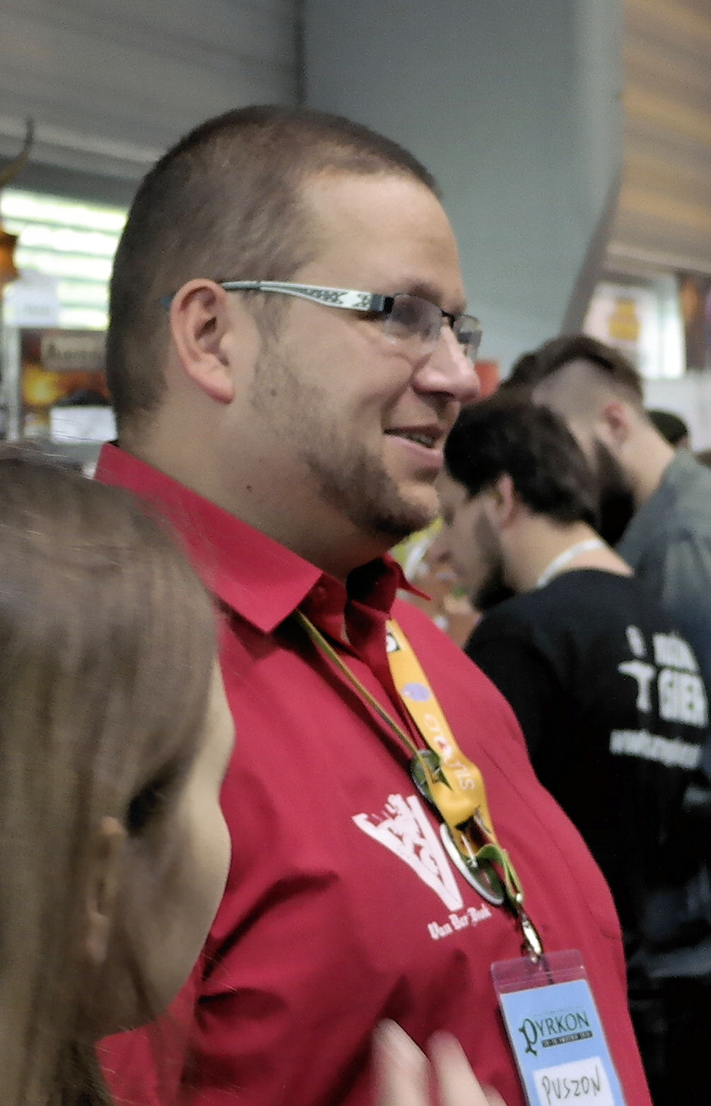 Michał Stachyra, Festiwal Fantastyki Pyrkon w Poznaniu